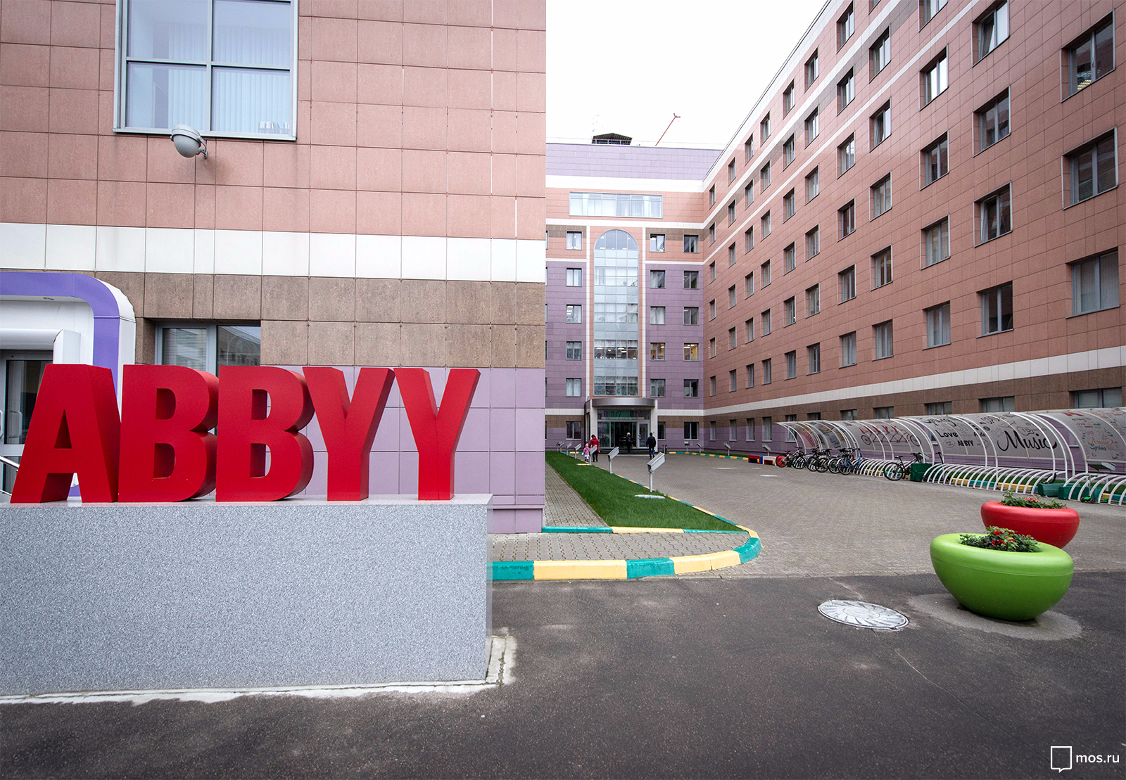 Технопарк Отрадное (октябрь 2016)